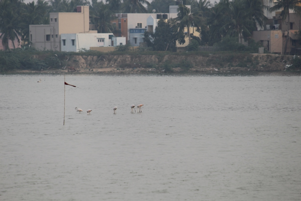 கொரட்டூர் ஏரியிலுள்ள பூநாரைகள்